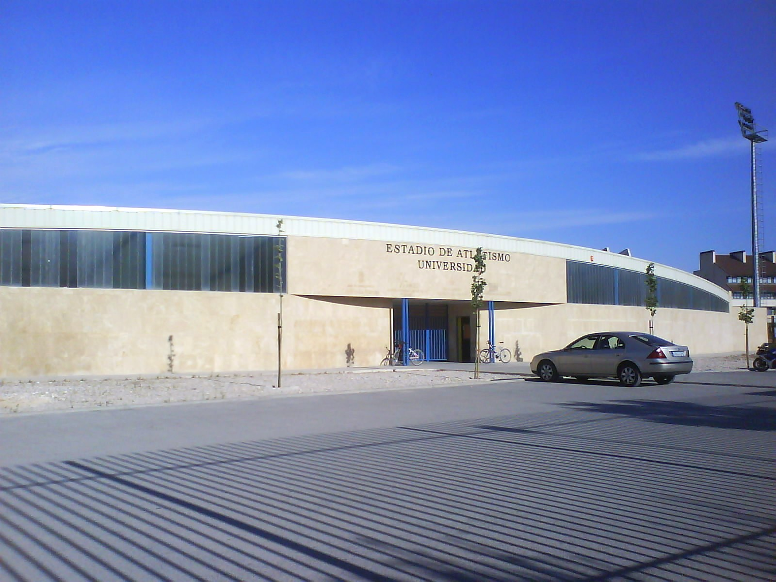 Estadio de Atletismo de la UCLM en Albacete, dentro del servicio de deportes de la Universidad.